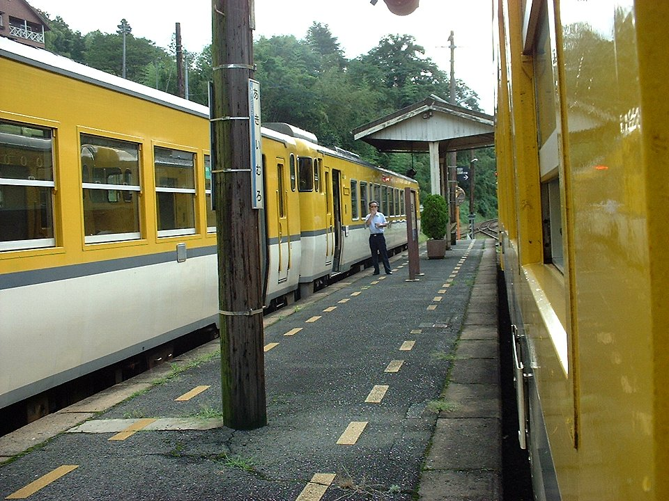 可部線（廃止区間）安芸飯室駅 列車交換中